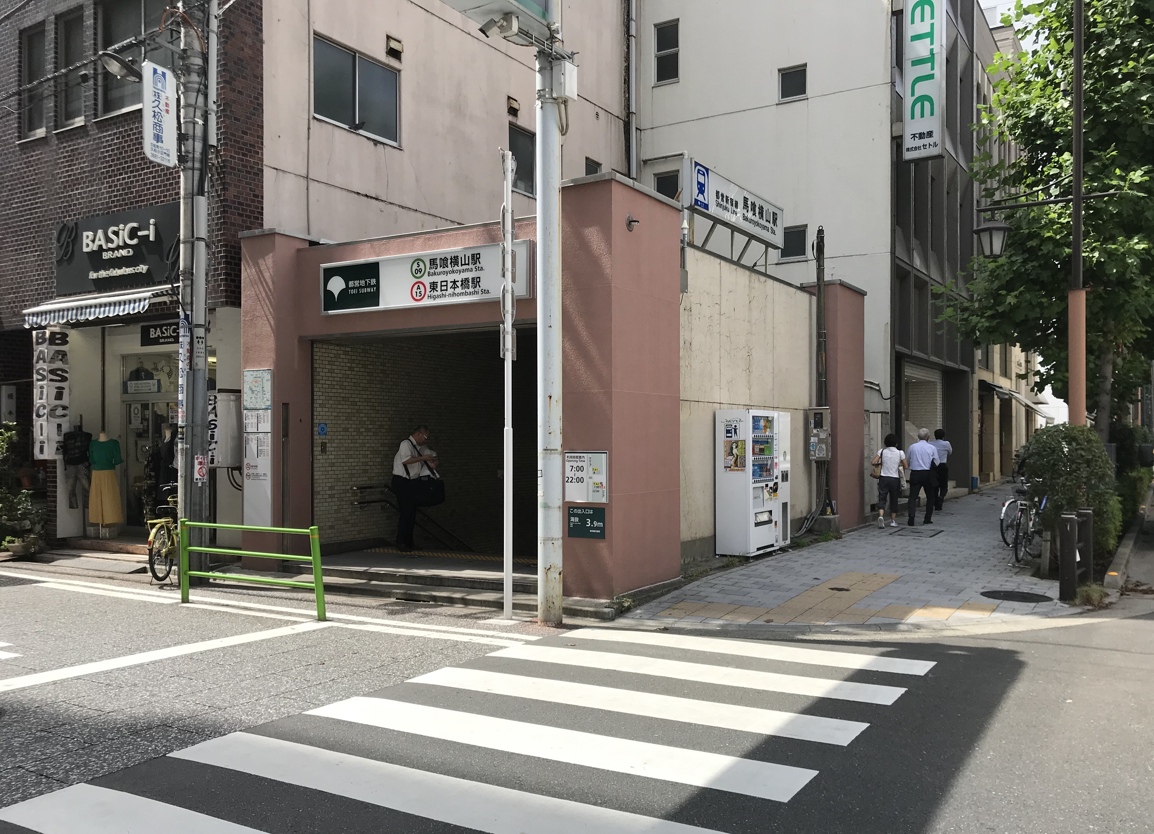 都営地下鉄新宿線馬喰横山駅A2番出入口